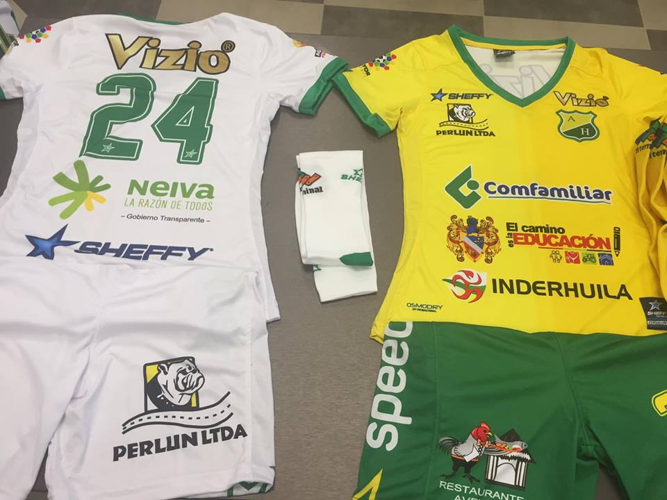 Uniformes de Atletico Huila Femenino